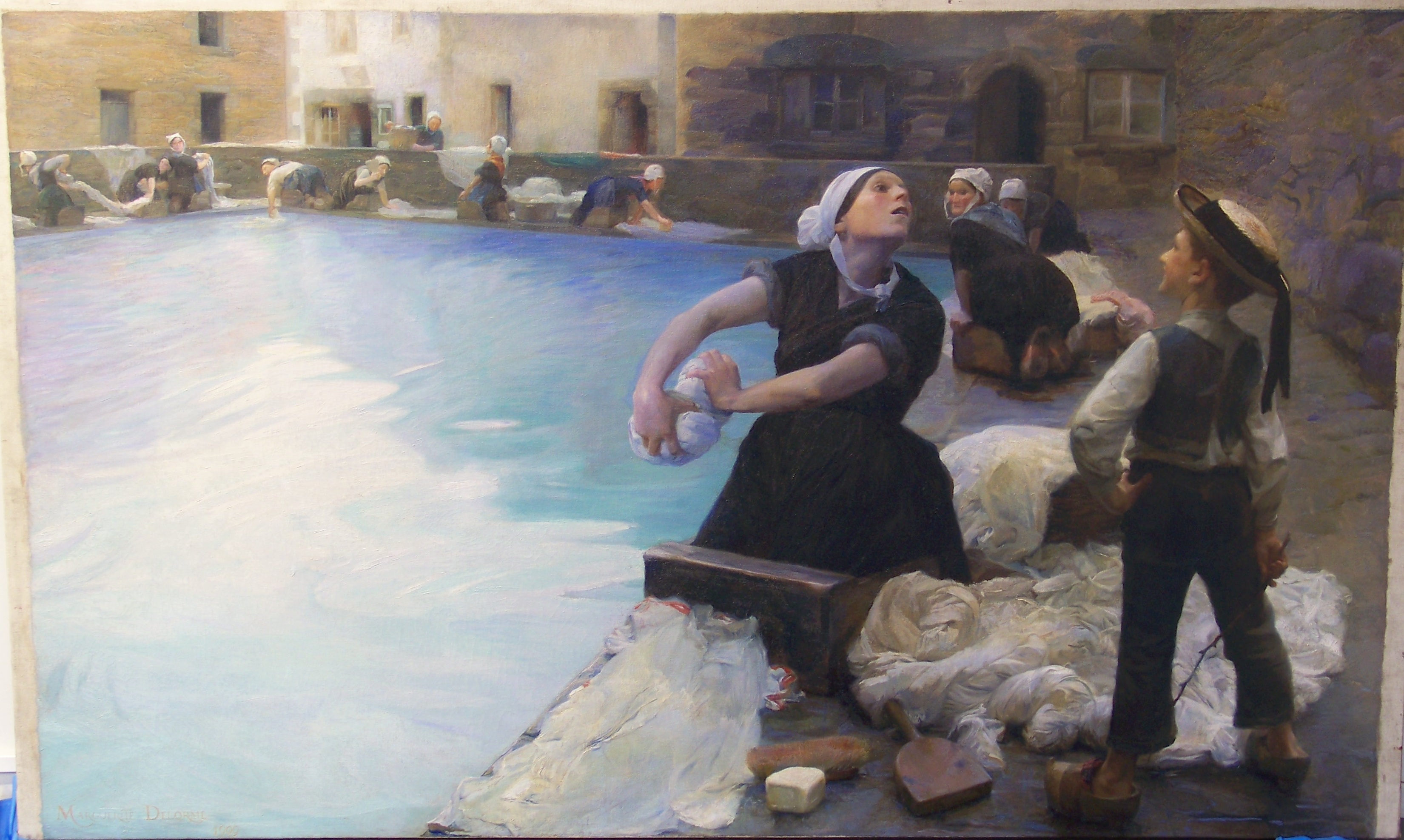 Tableau donné en 1909 au musée du château de Lunéville après avoir reçu le prix Gallimard-Jaubert au Salon de la Société des Artistes Français.